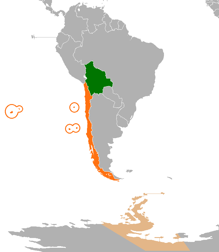 Localización de Bolivia y Chile